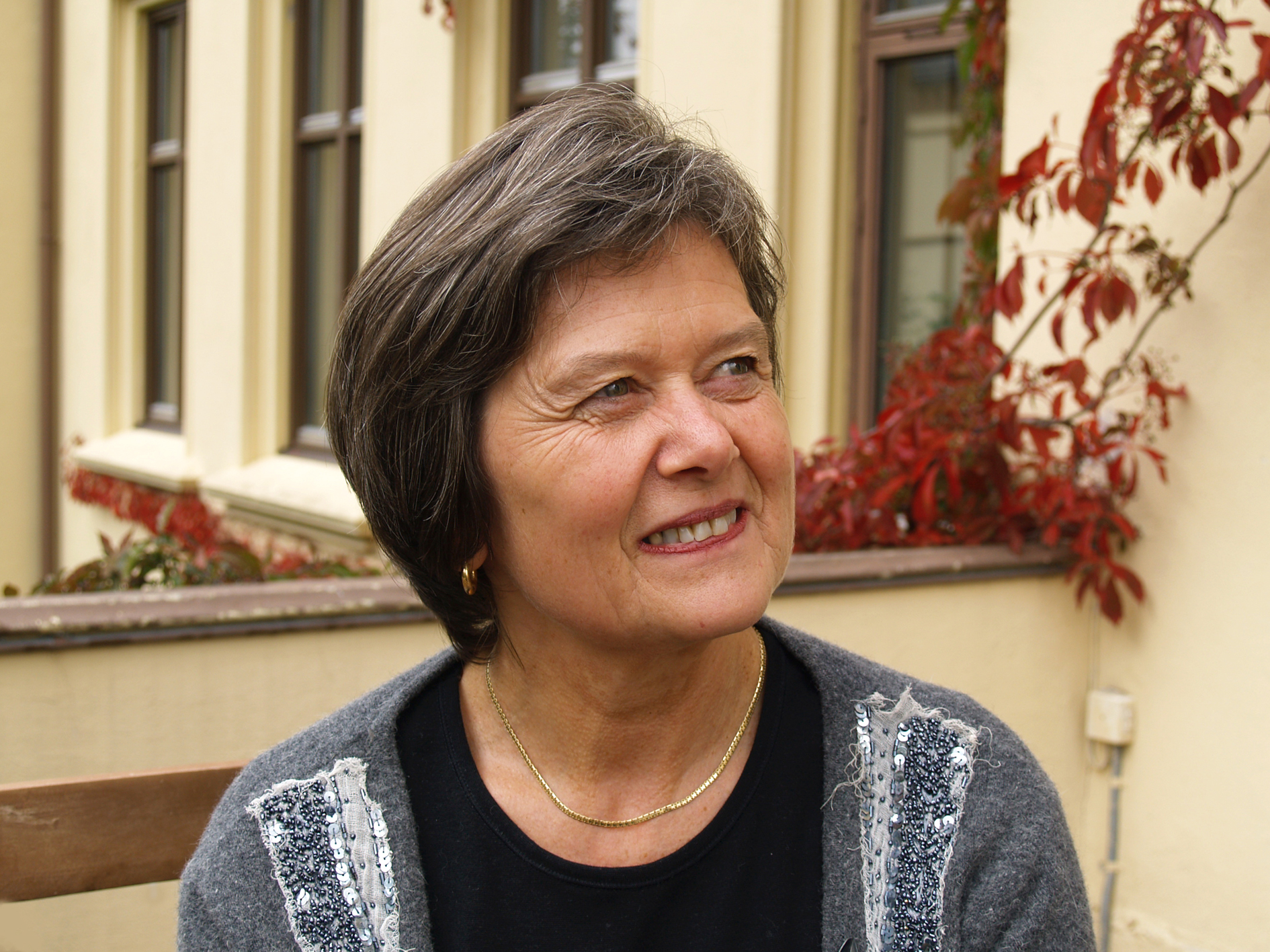 Biskop i Borg, Helga Haugland Byfuglien Haugland Byfuglien er født i 1950 og ble utnevnt til biskop i Borg bispedømme i 2005.